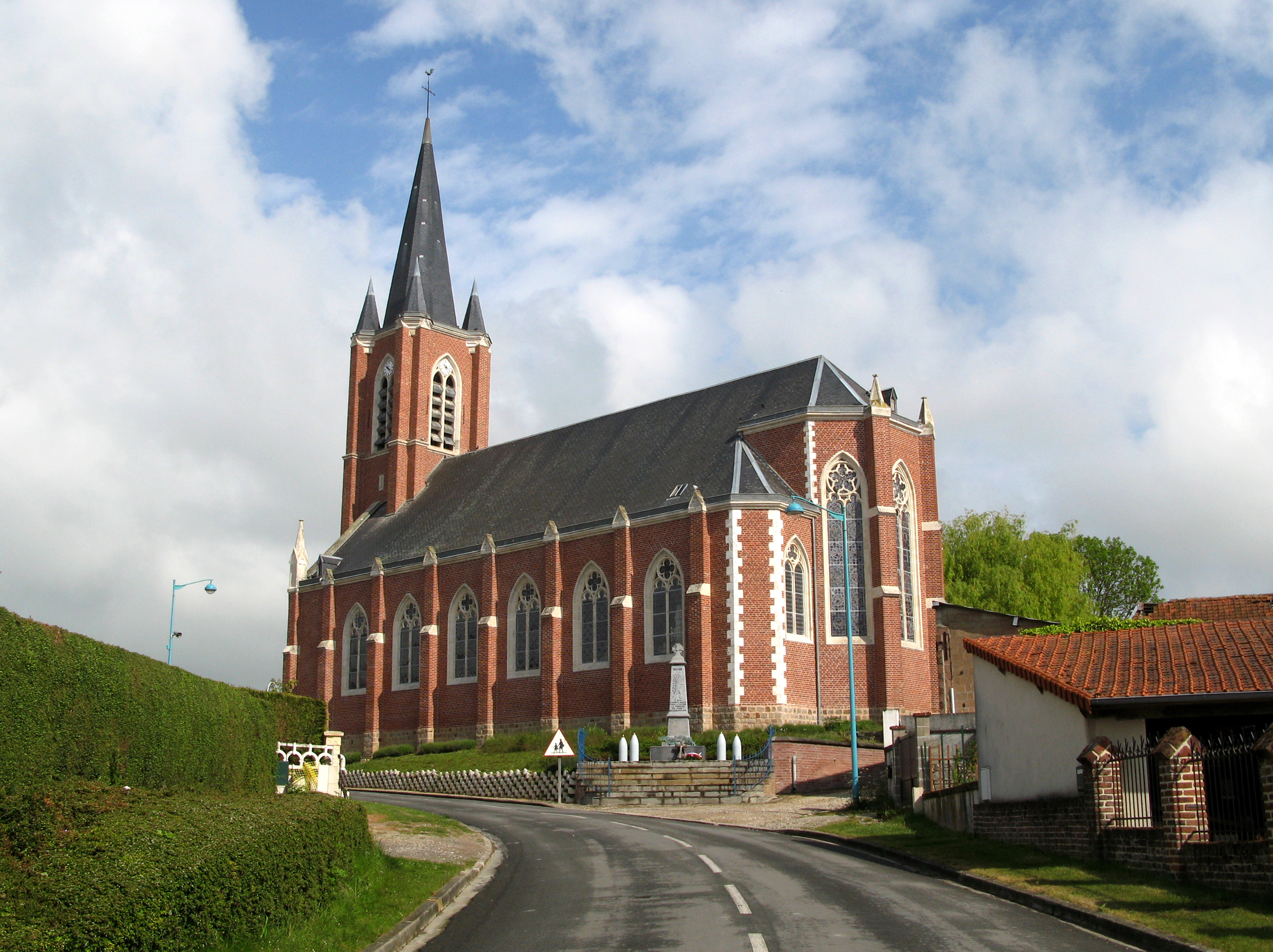 Coisy (Somme, France) - L'église. On remarque le monument-aux-morts, juste dans l'axe de la rue.